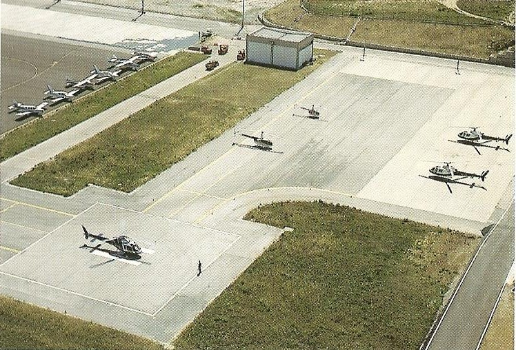 Heliporto Tires